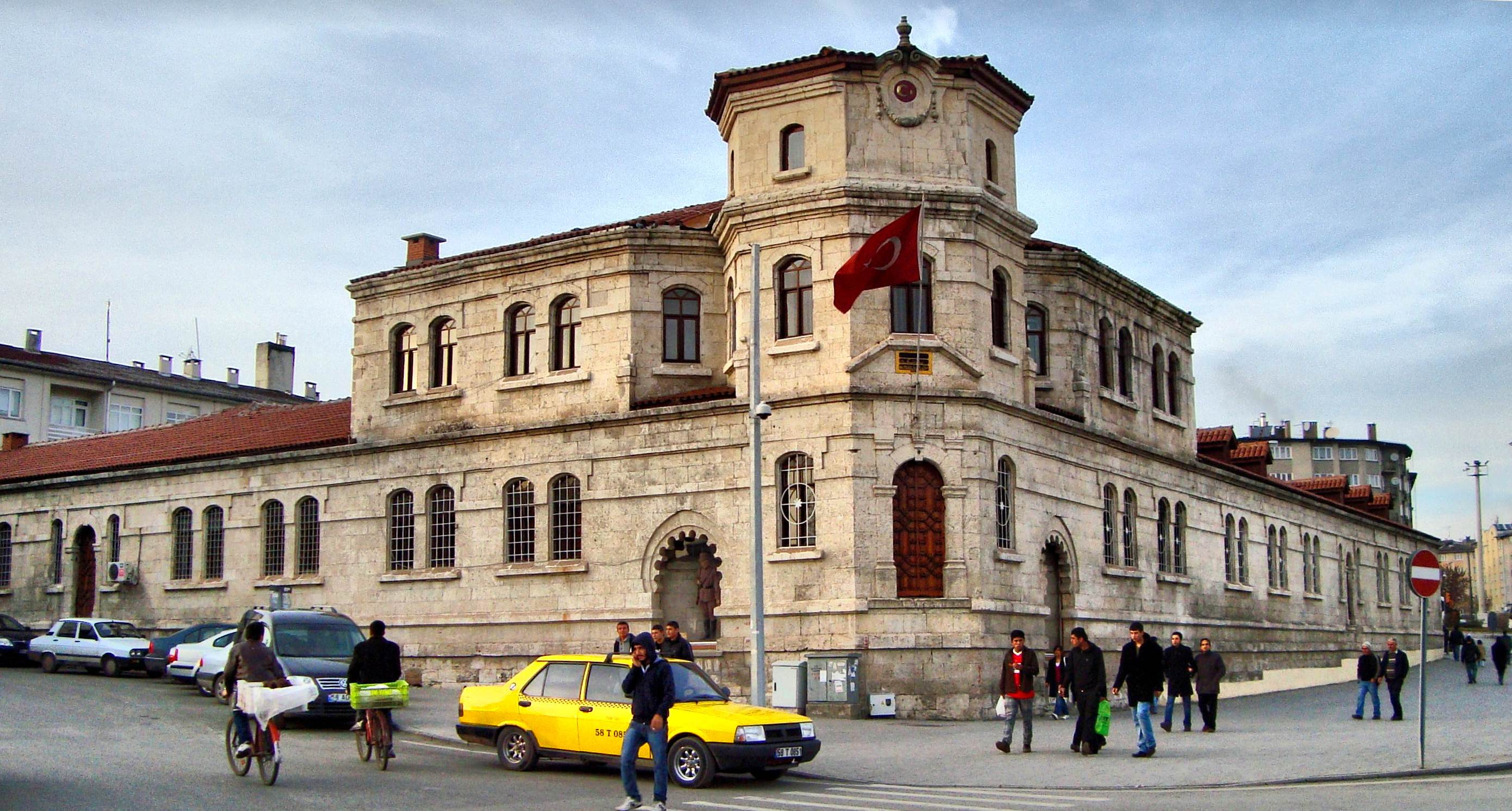 1908 yılından 1993 yılına dek Sivas'ta jandarma kışlası olarak kullanılan tarihî bina.